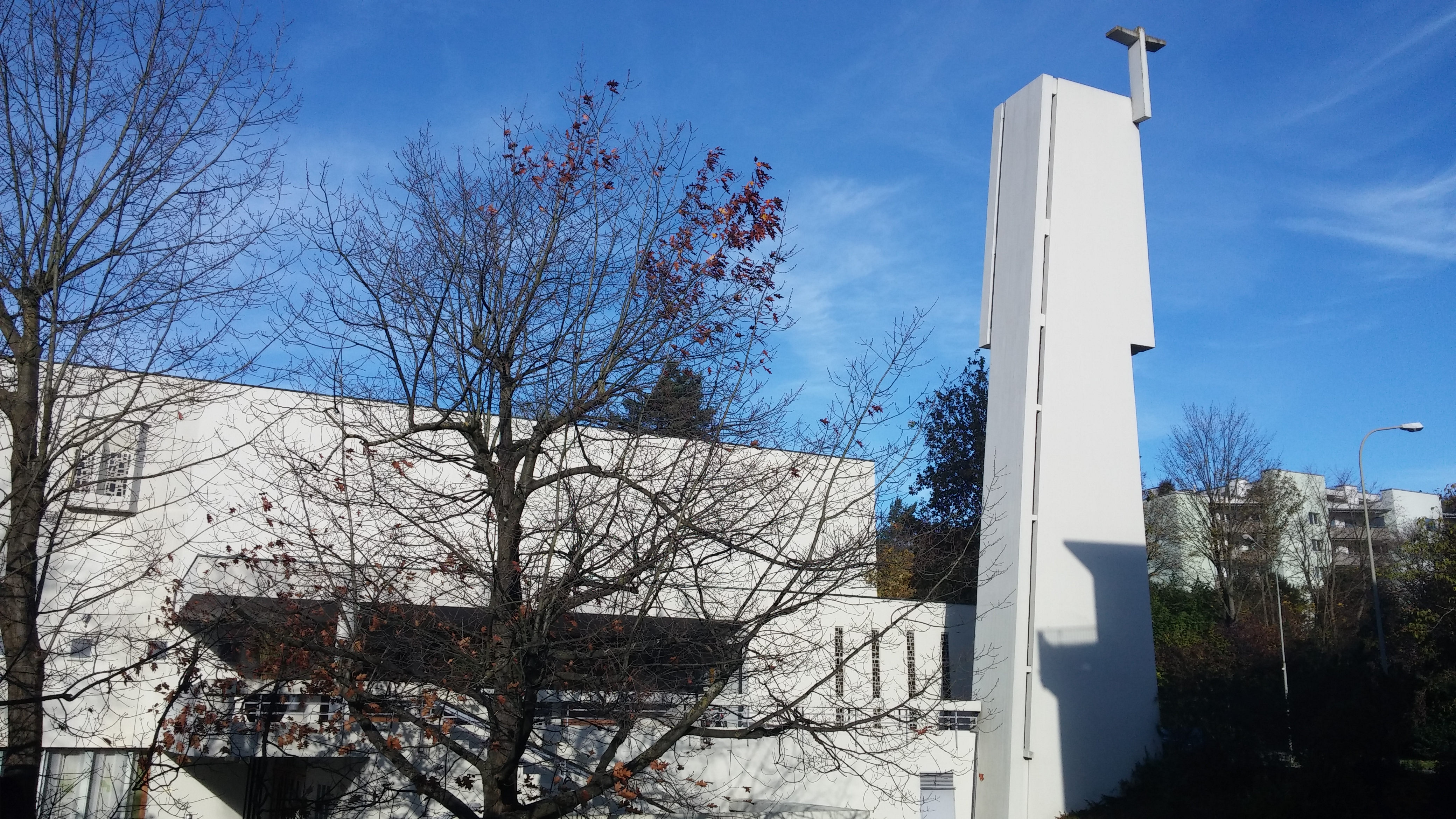 Römisch-katholische Pfarrkirche St. Mauritius Oberengstringen, östliche Fassade